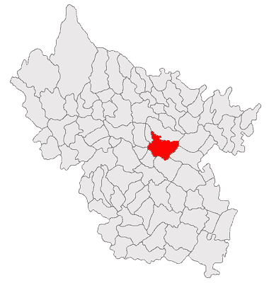 Categorie:Hărţi ale judeţului Buzău